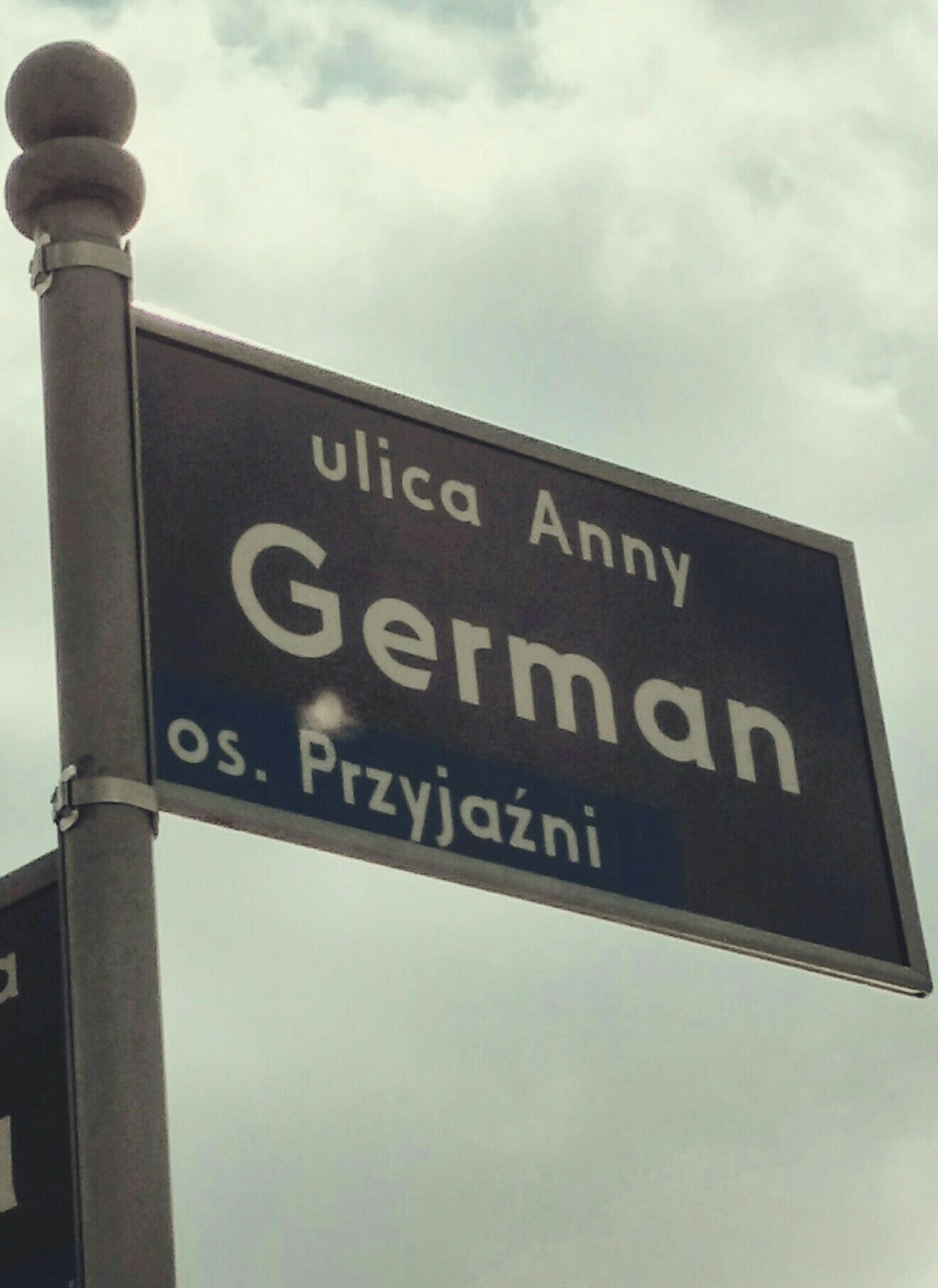 Tabliczka z nazwą ulicy Anny German w Poznaniu